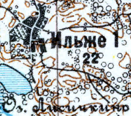 Топографическая карта Ленинградской области, квадрат VIc-28 (Луга), деревня Ильжо 1